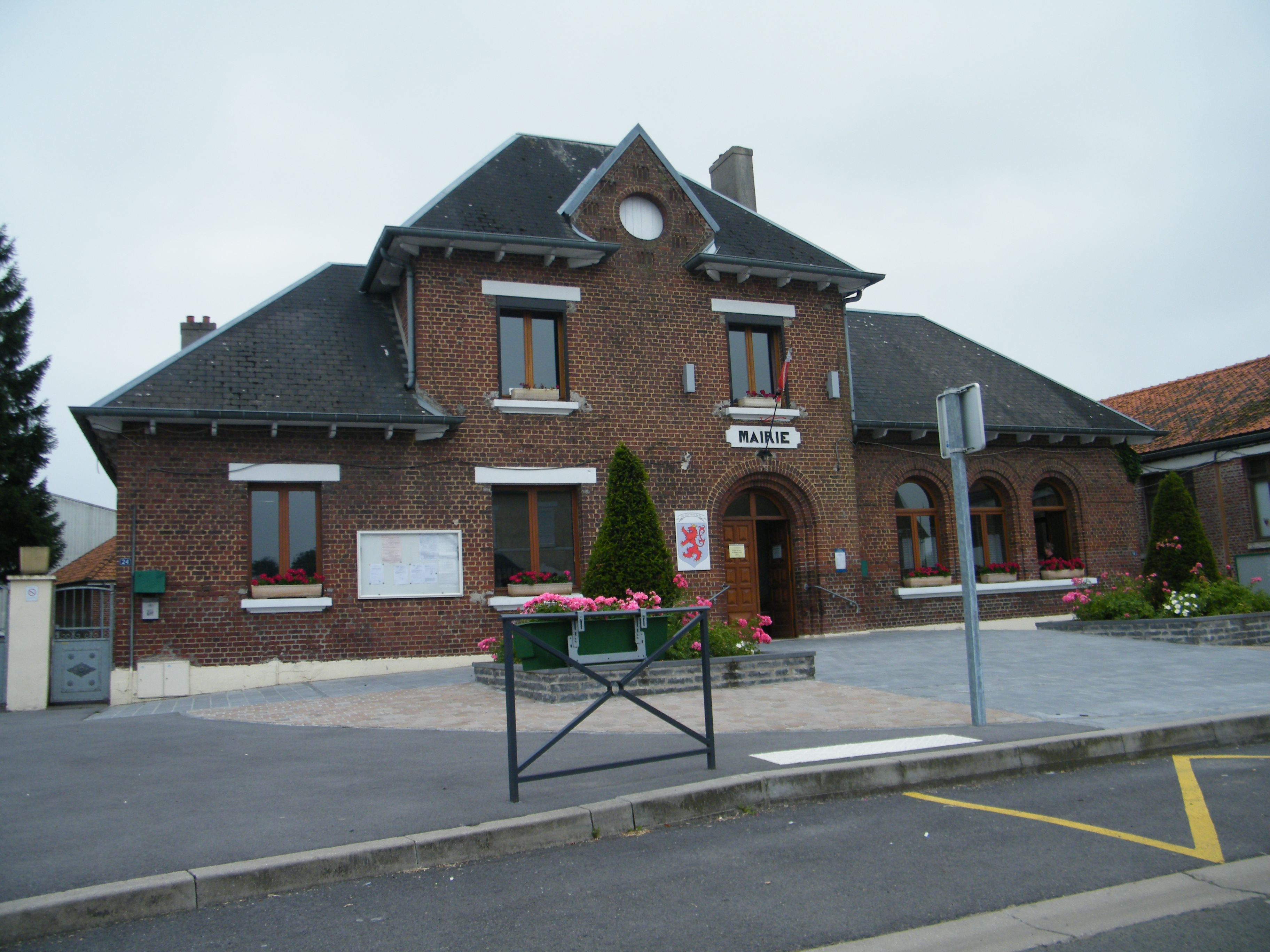 Mairie-école.